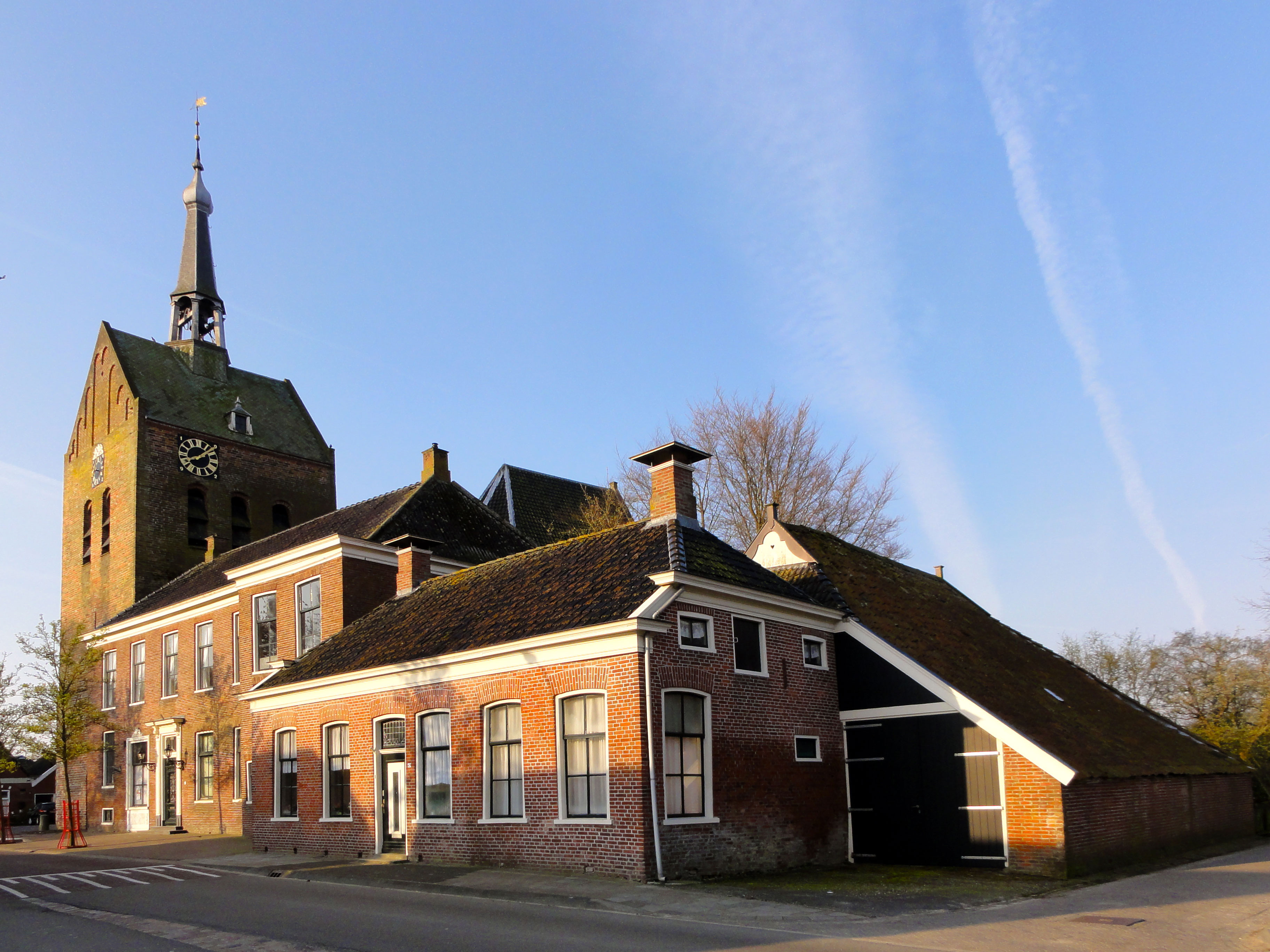 Winkel/woning met schuur Hoofdstraat 47 't Zandt